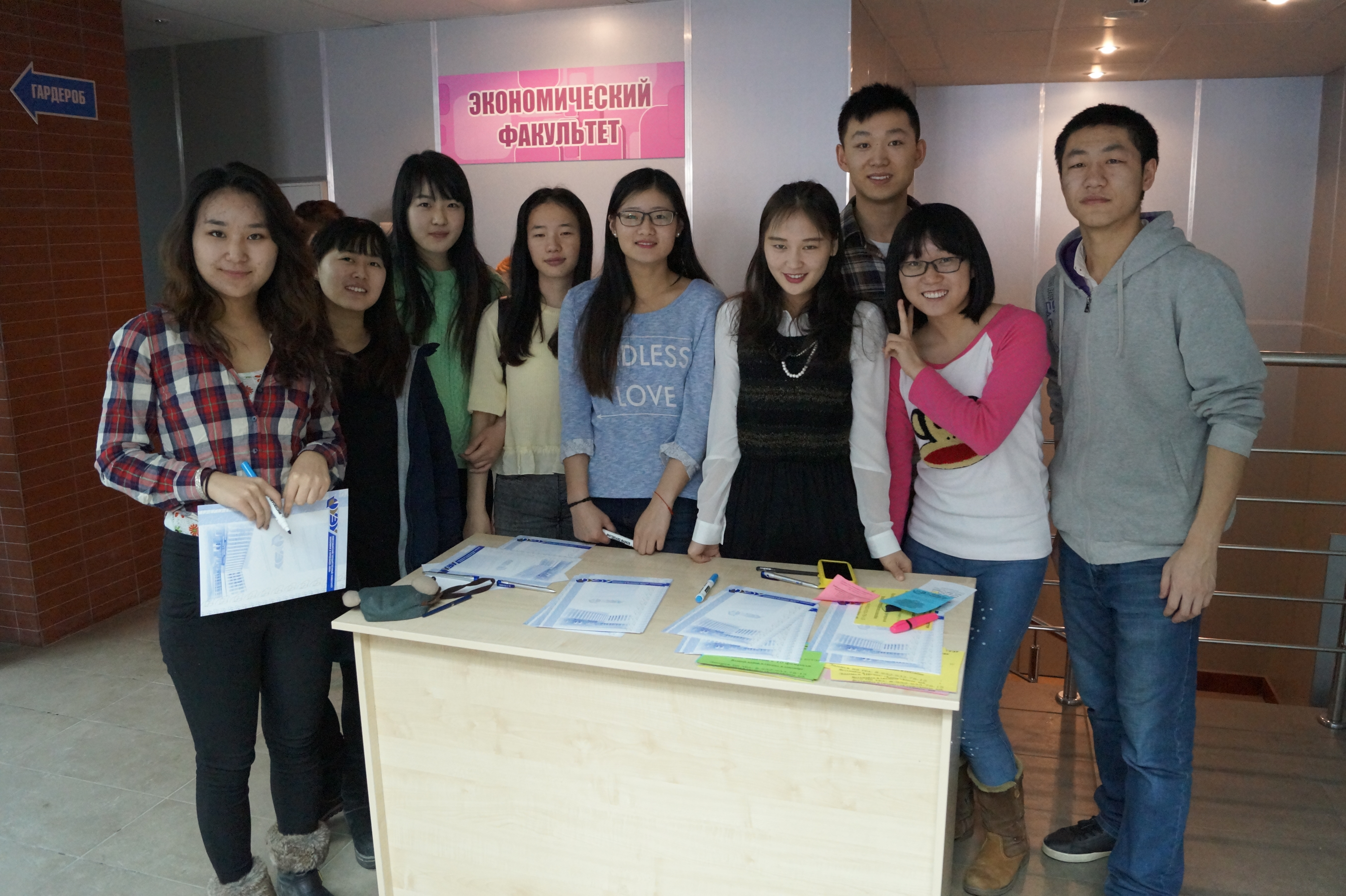 Иностранные студенты НГУЭУ на Дне открытых дверей